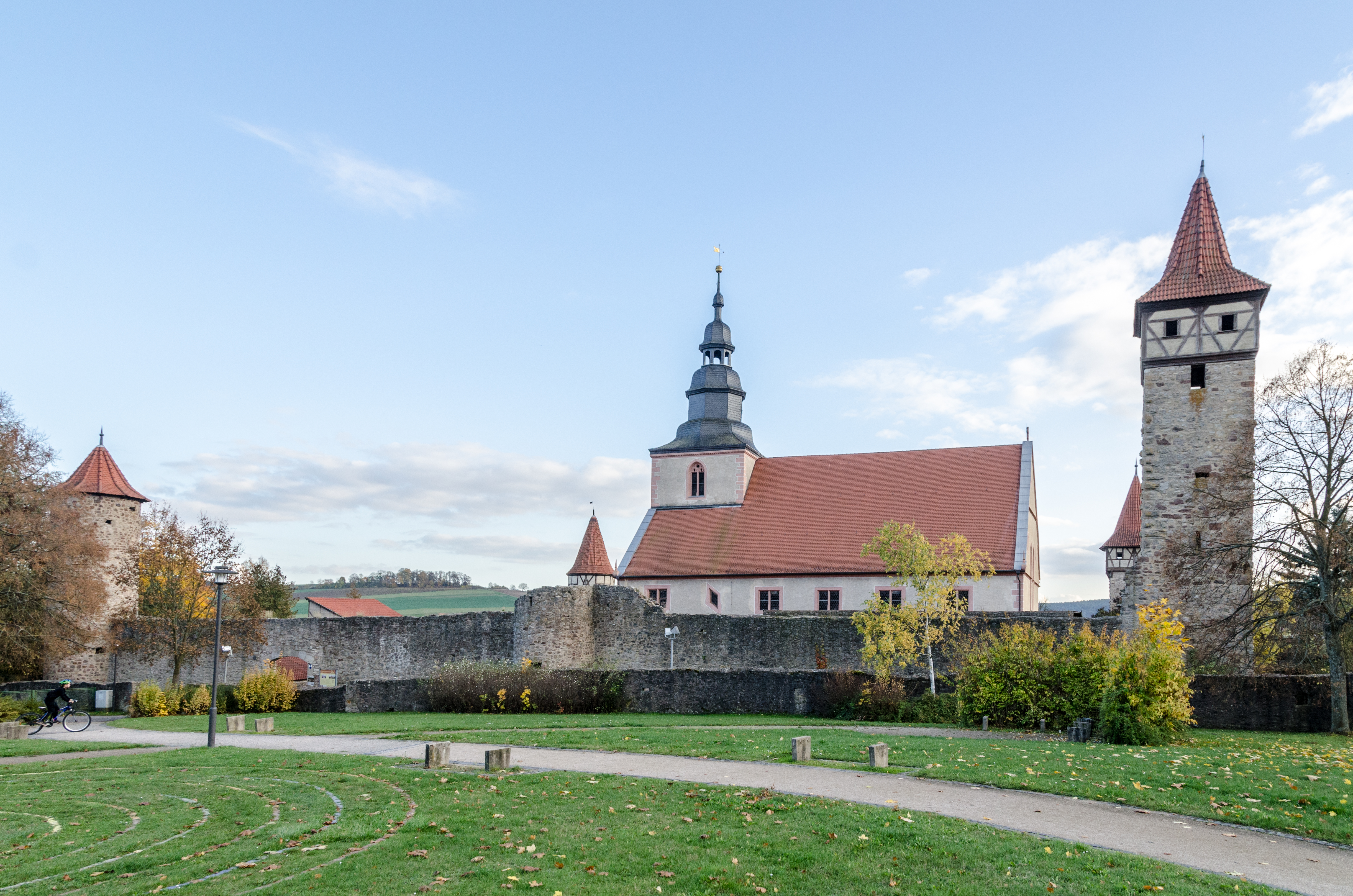 Ostheim vor der Rhön, Kirchenburg, Nordseite